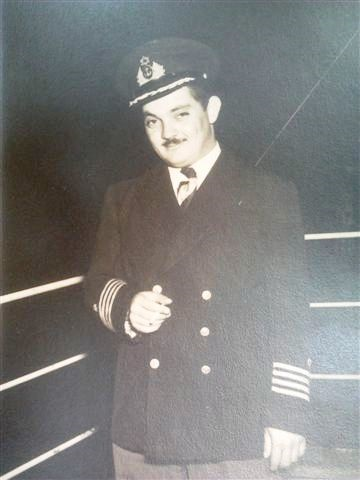 רב חובל מלאכי אפרת בוגר מחזור א' ויו"ר עמותת הבוגרים הראשון. 1980